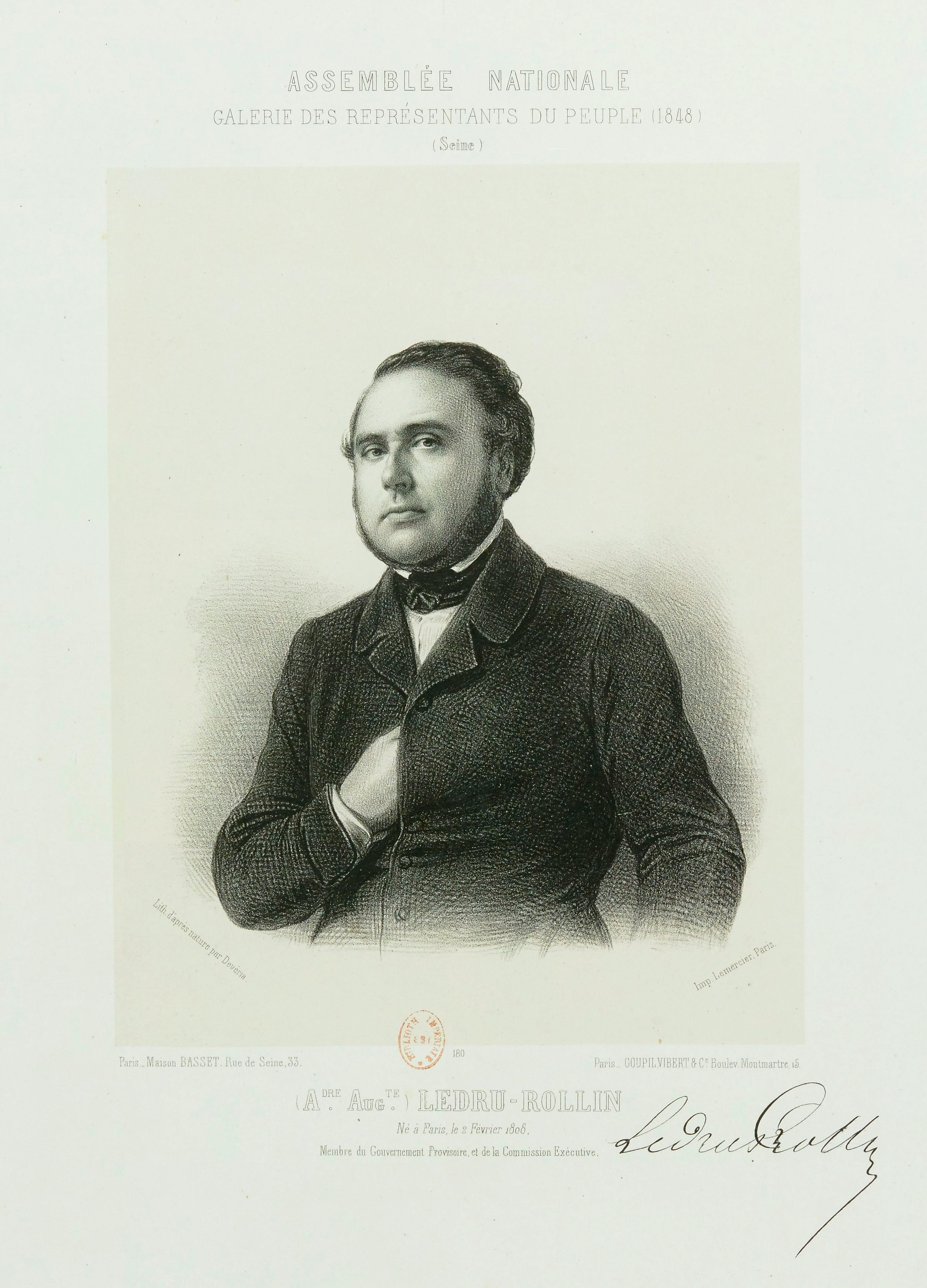 Assemblée nationale, galerie des représentants du peuple - Alexandre Ledru-Rollin